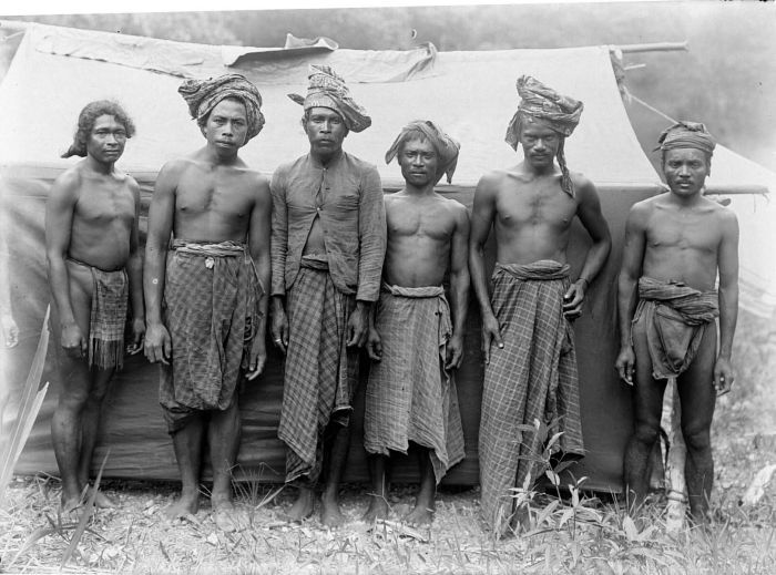 Negatief. Een groep Galelarezen uit het dorp Pangeo